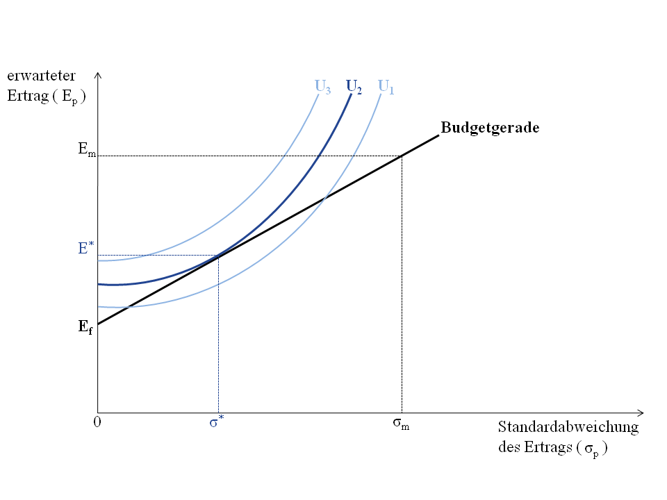 Grafik